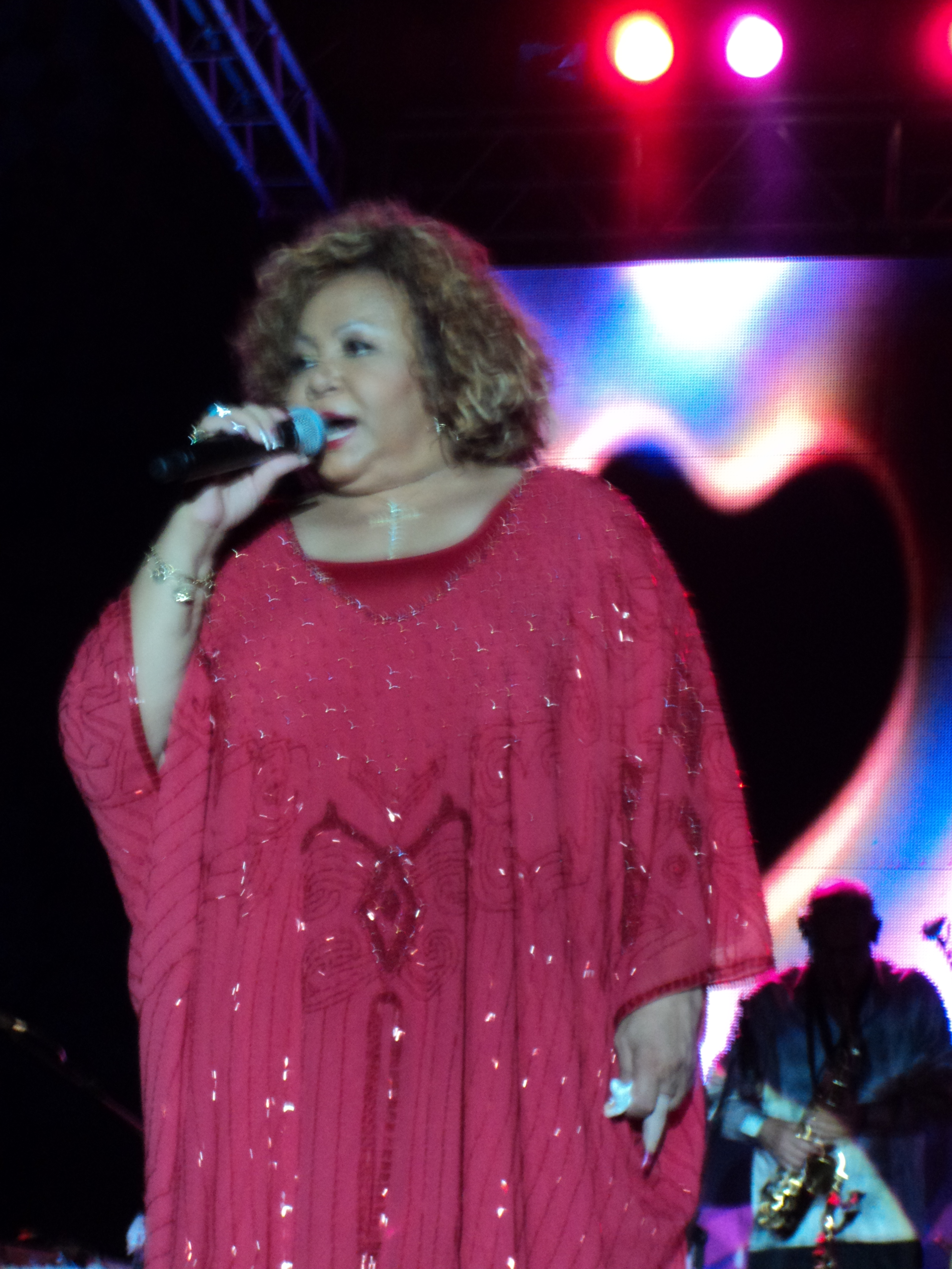 Alcione durante espetáculo no Clube Português de Recife em 2011-05-28.